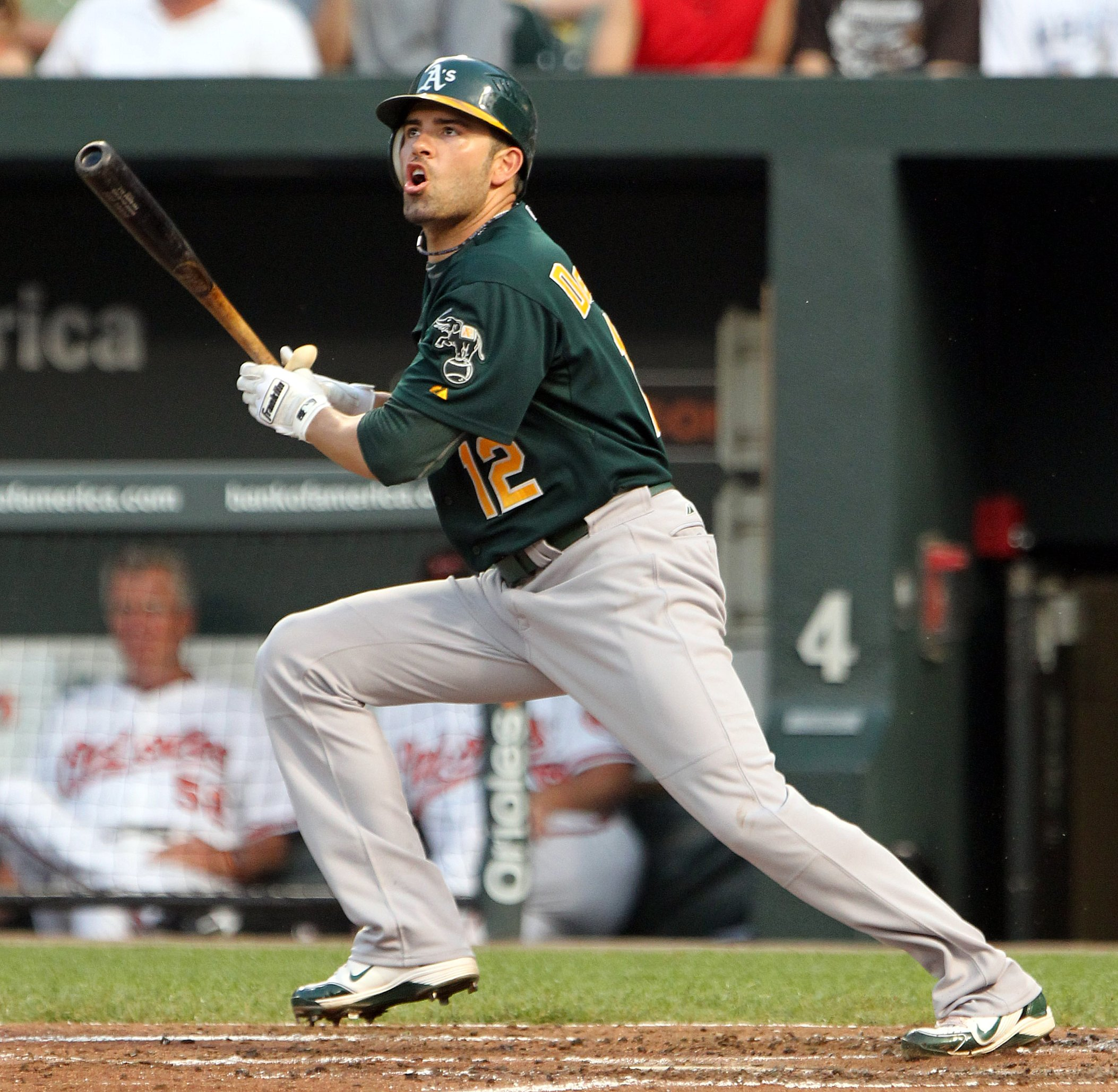 David DeJesus